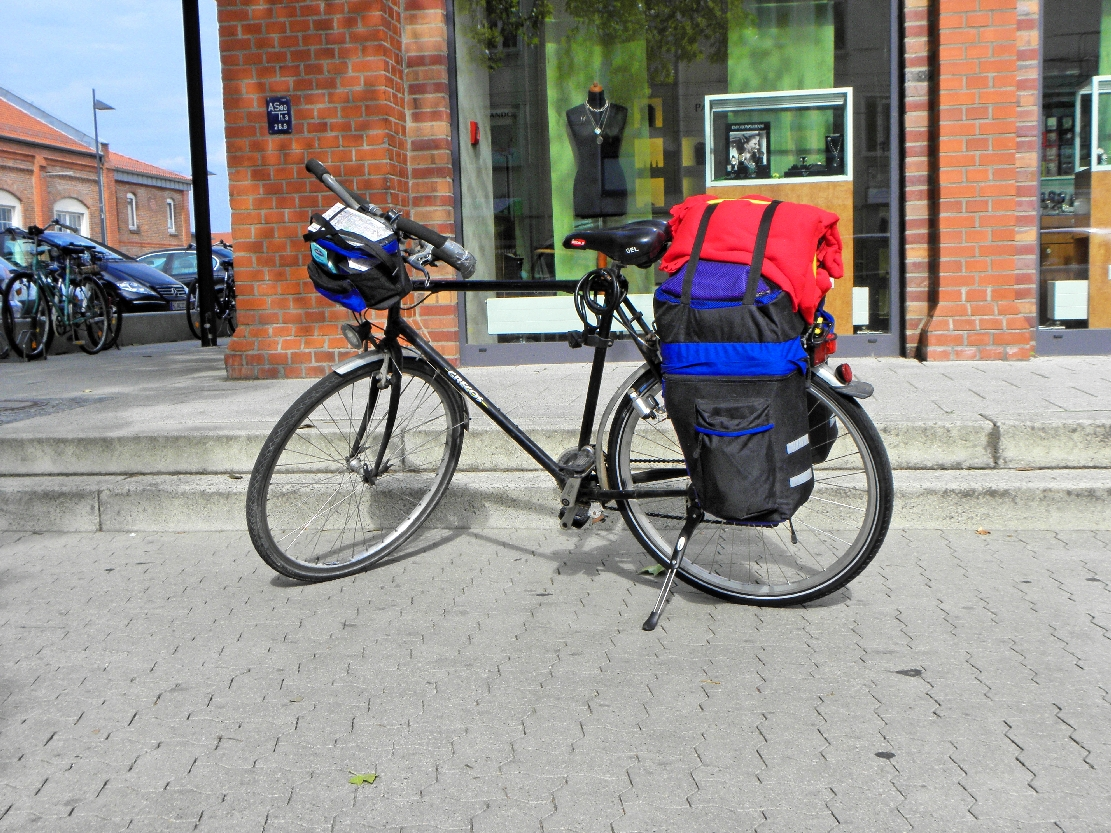 Radtour Hannover-Niederelbe 2013